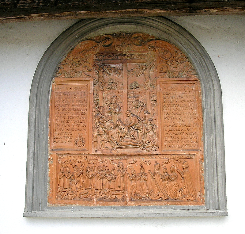 Friedhofskapelle zu den Vierzehn Nothelfern (Welden, Landkreis Augsburg, Bayerisch-Schwaben). Epitaph Hohenrainer (um 1566). Eigene Aufnahme, Sept. 2007 / Cemetery chapel "Fourteen Holy Helpers" at Welden near Augsburg (Bavaria, Germany). Epitaph Hohenrainer (ca. 1566). Own photo, Sept. 2007